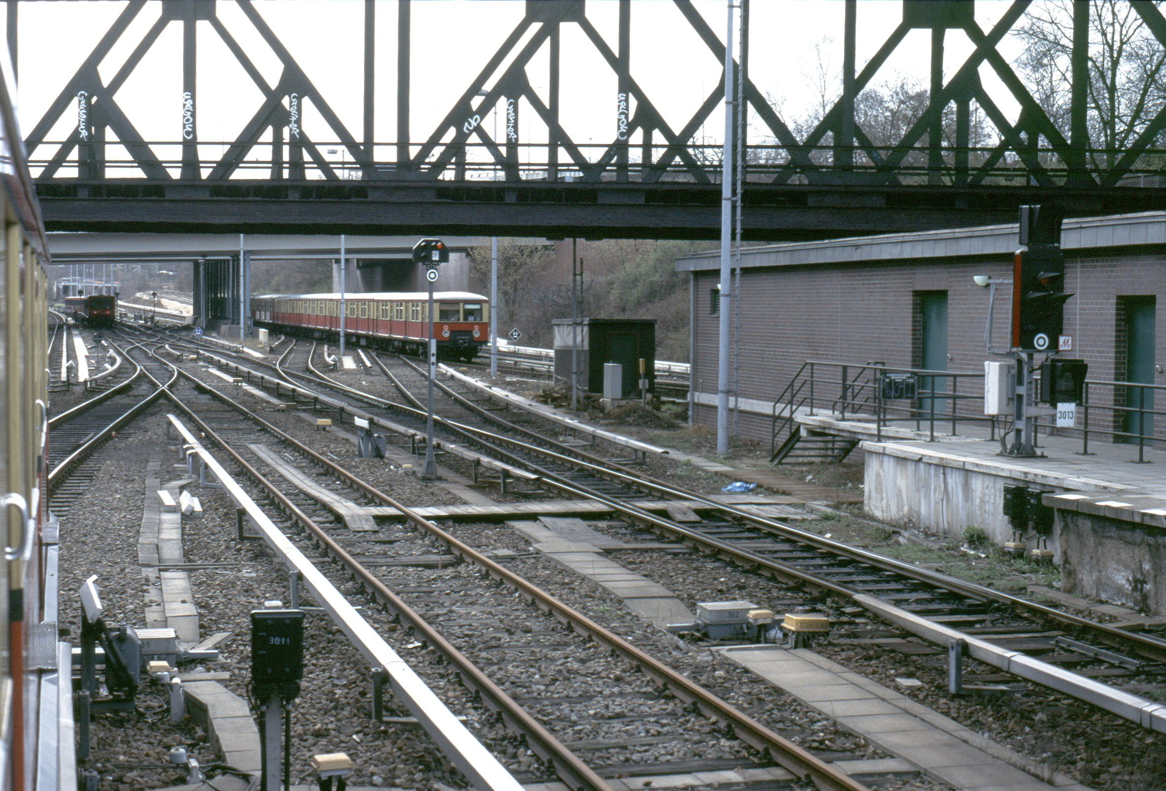 Südwestliche Wendegleise Berlin Westkreuz